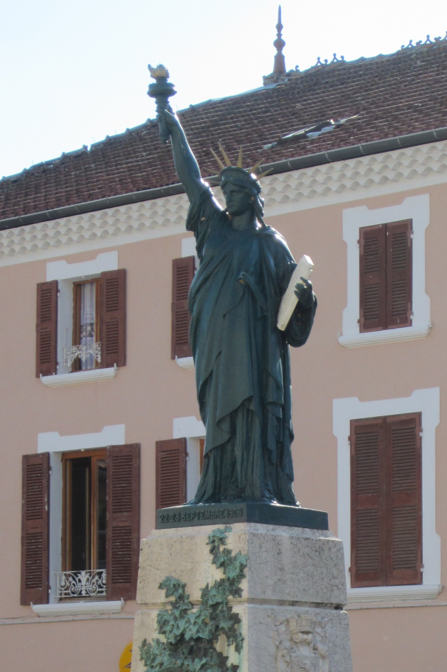 La statue de la Liberté de Roybon